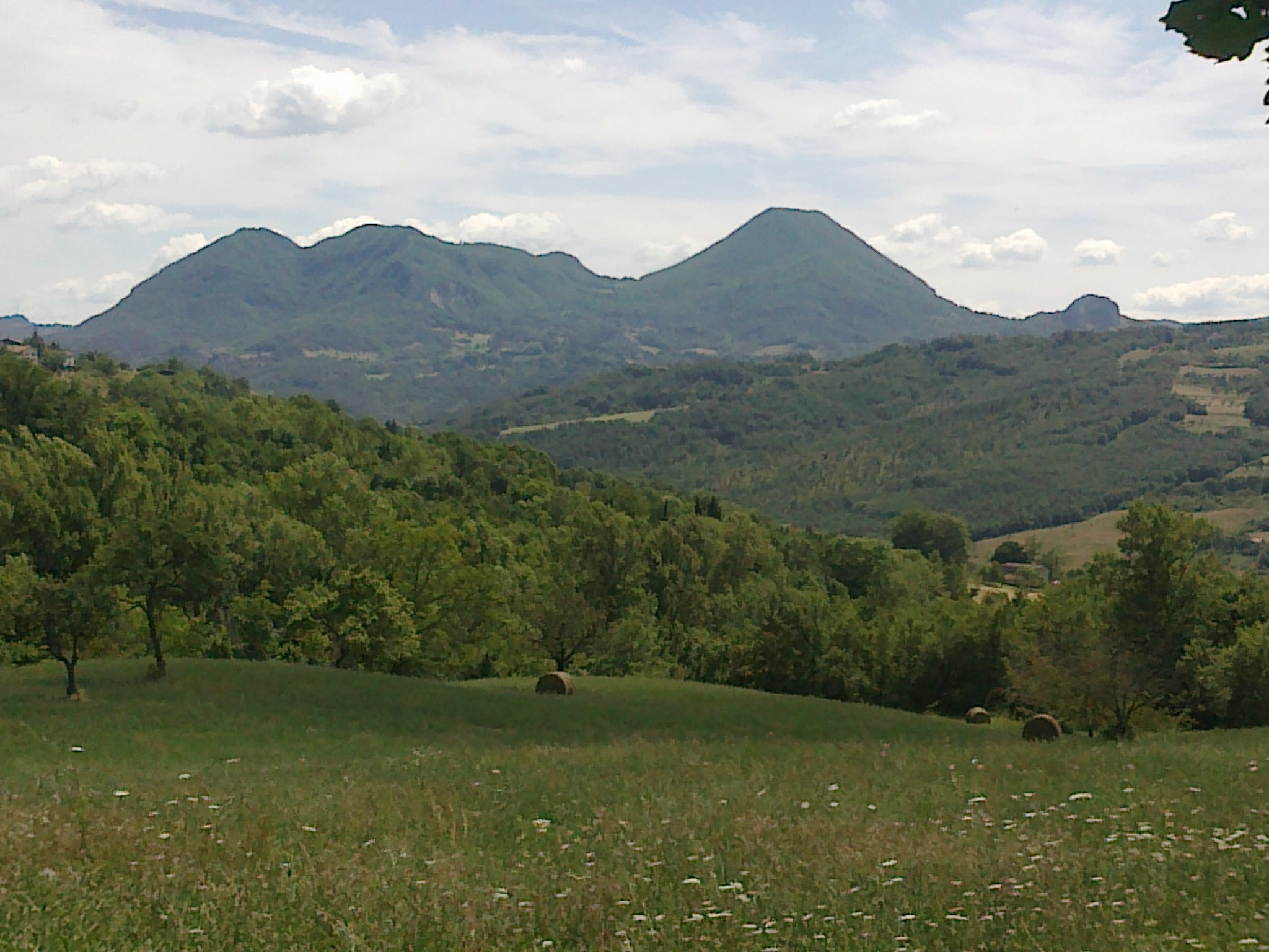 Il compleesso di monte Vigese